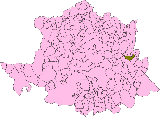 Bohonal de Ibor